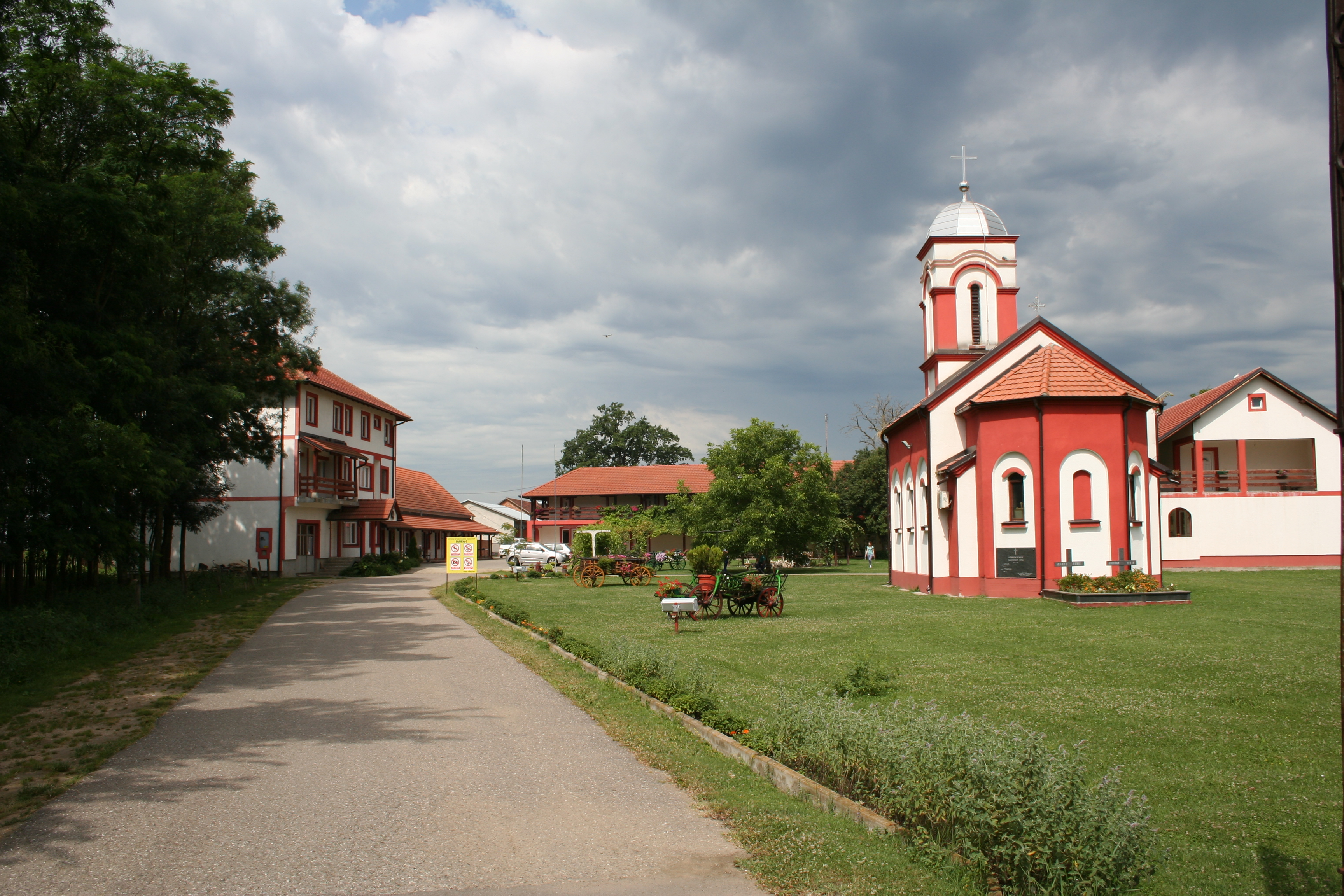 Manastir Ilinje, Očage